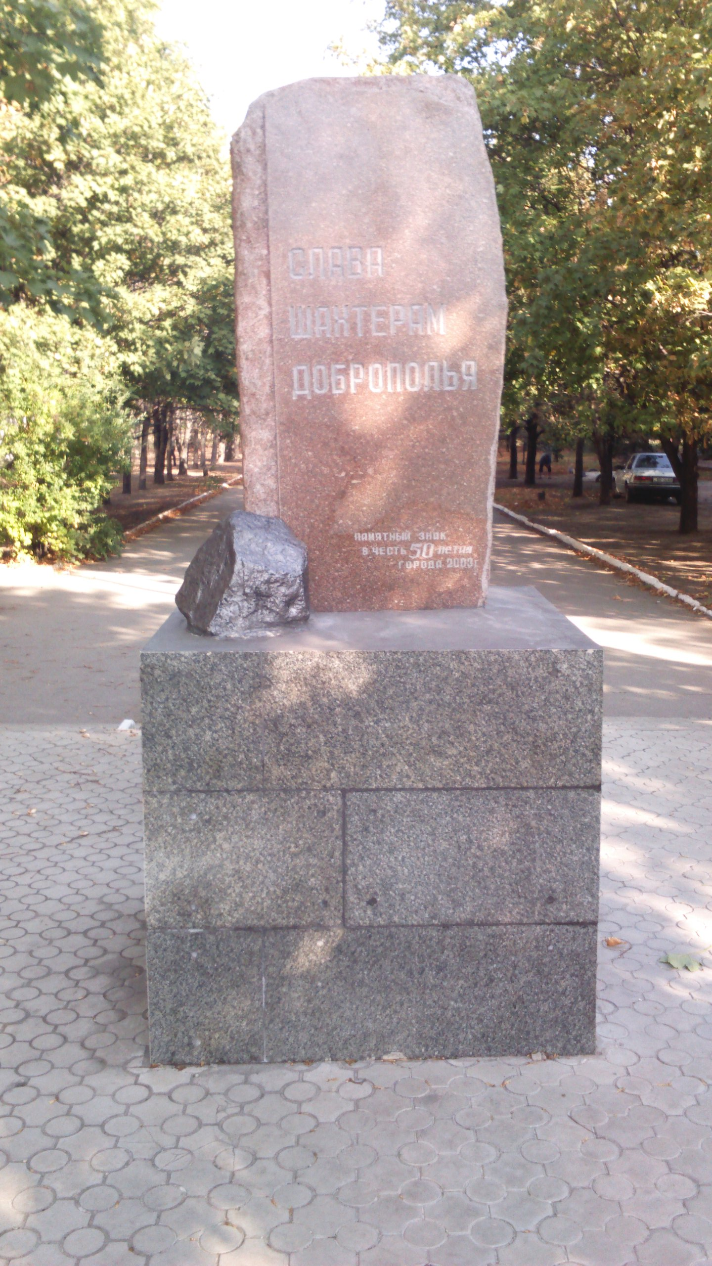 Памятник Шахтарській праці місто Длбропілля.